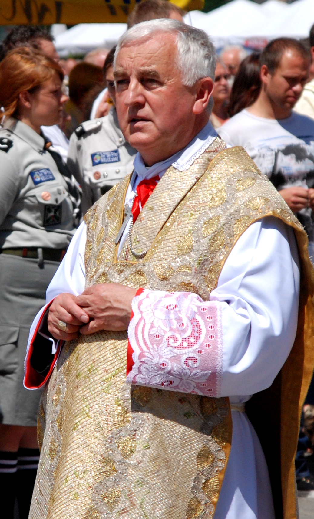 Jan Szkodoń. Procesja Bożego Ciała w Krakowie